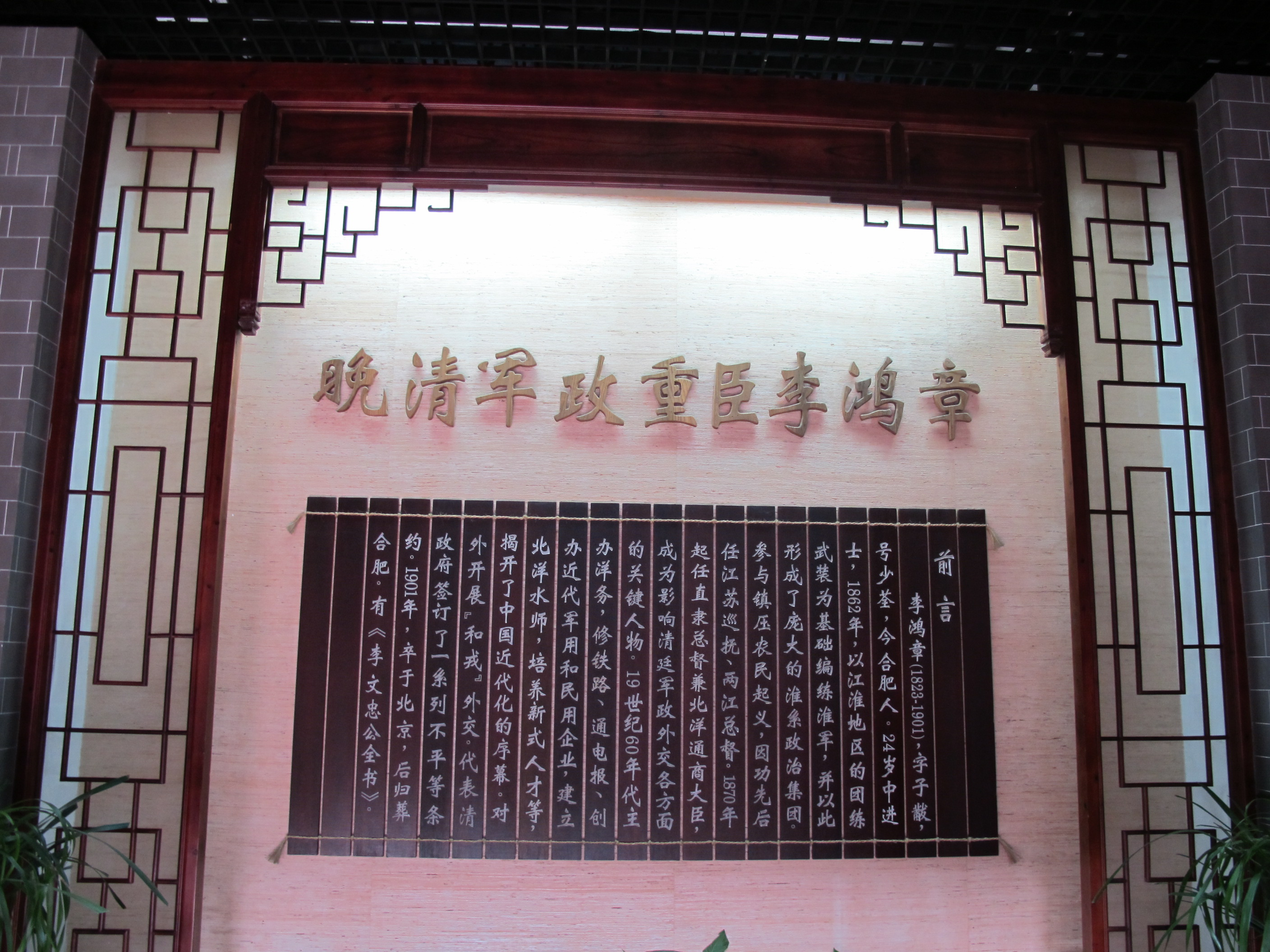 晚清军政重臣李鸿章简介